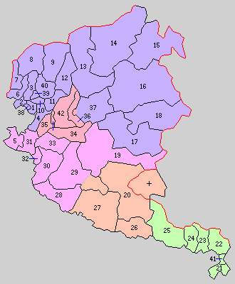 和歌山県西牟婁郡の町村制時点の町村。